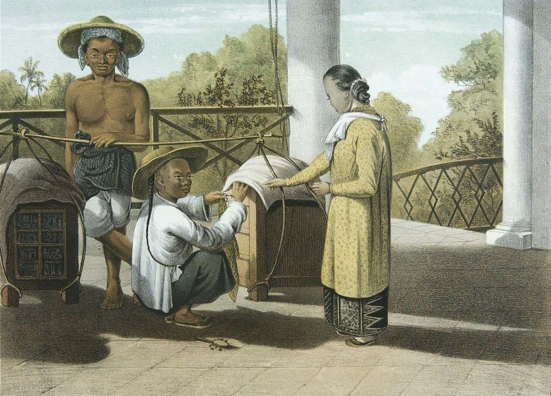 Litho. Litho naar een oorspronkelijke tekening van A. van Pers. Serie van losse gelithografeerde platen.. Een Chinese straatverkoper